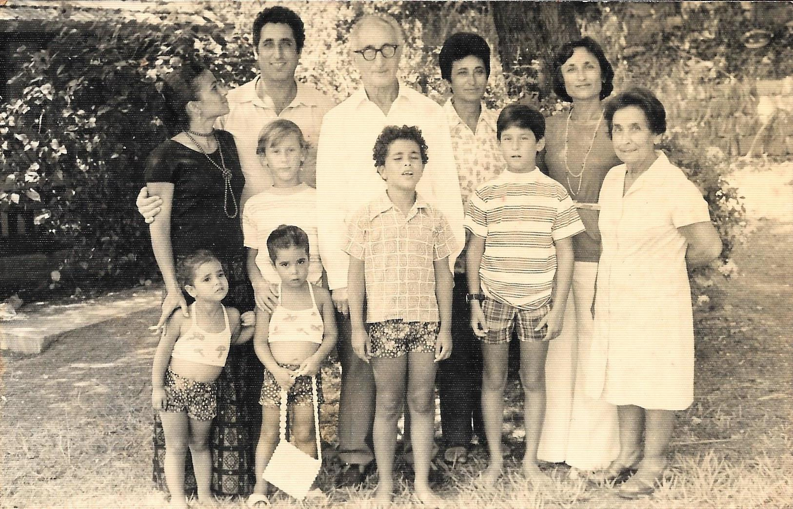 משפחת שצ'ופק בהרכב מלא גדי שפי שני משמאל